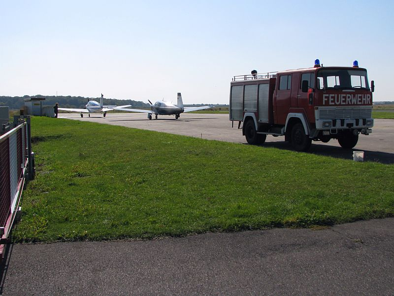 Flugplatz Mainz-Finthen Vorfeld-Tankstelle AVGAS Jet-A1 Superbenzin Feuerwehr